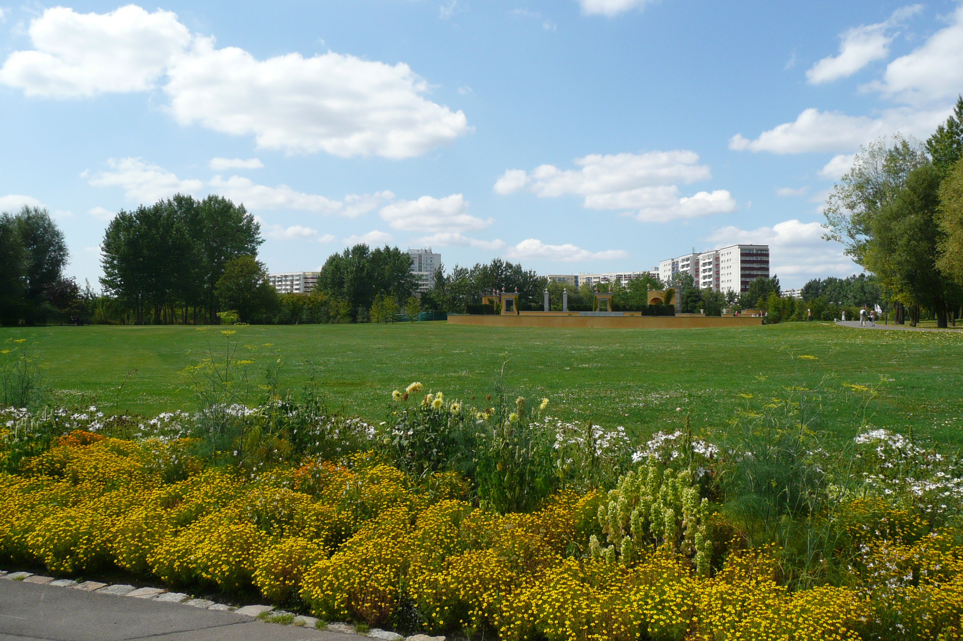 Erholungspark Marzahn)